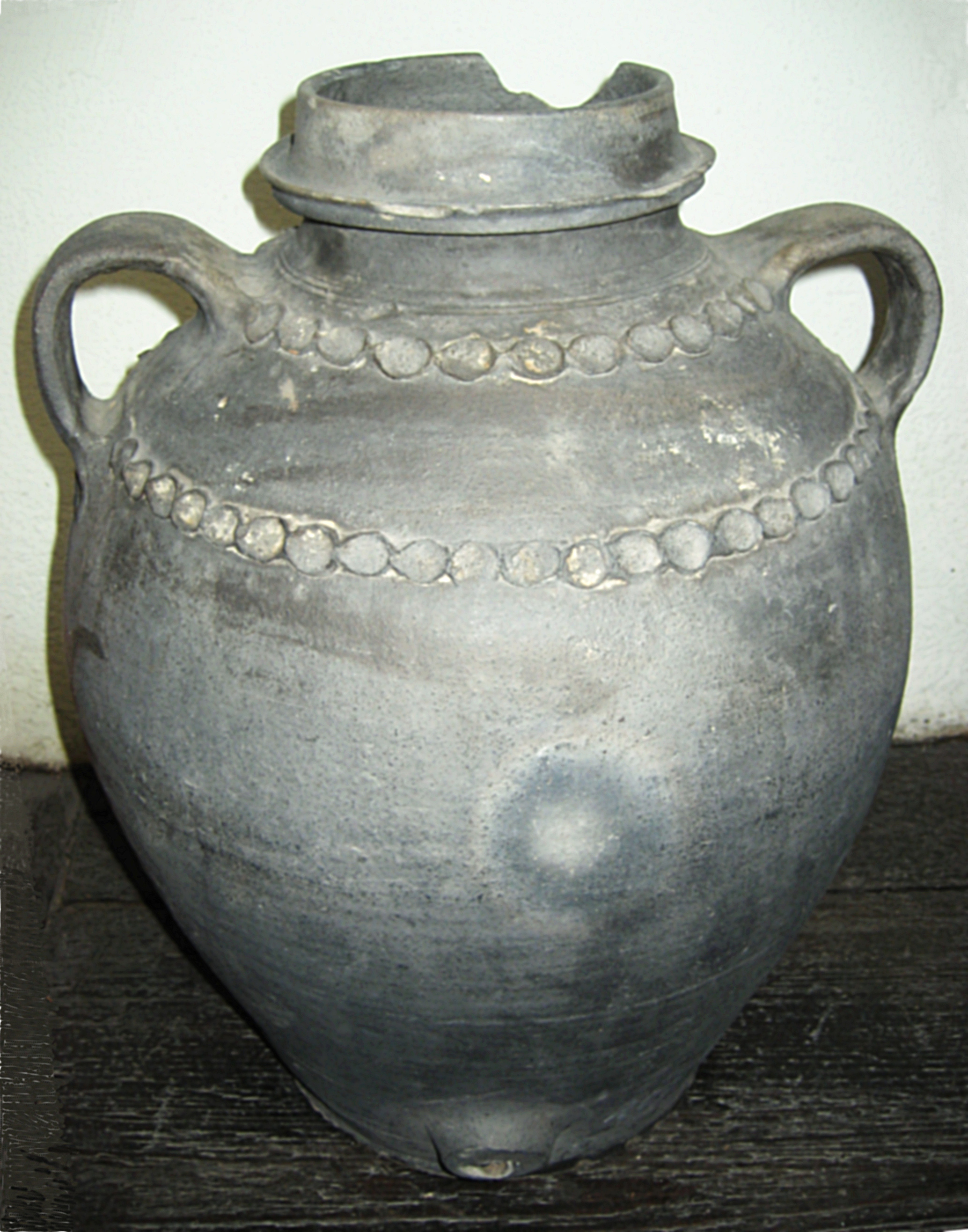 Vorratsgefäß aus Steinzeug aus Niederbayern / Rottal.